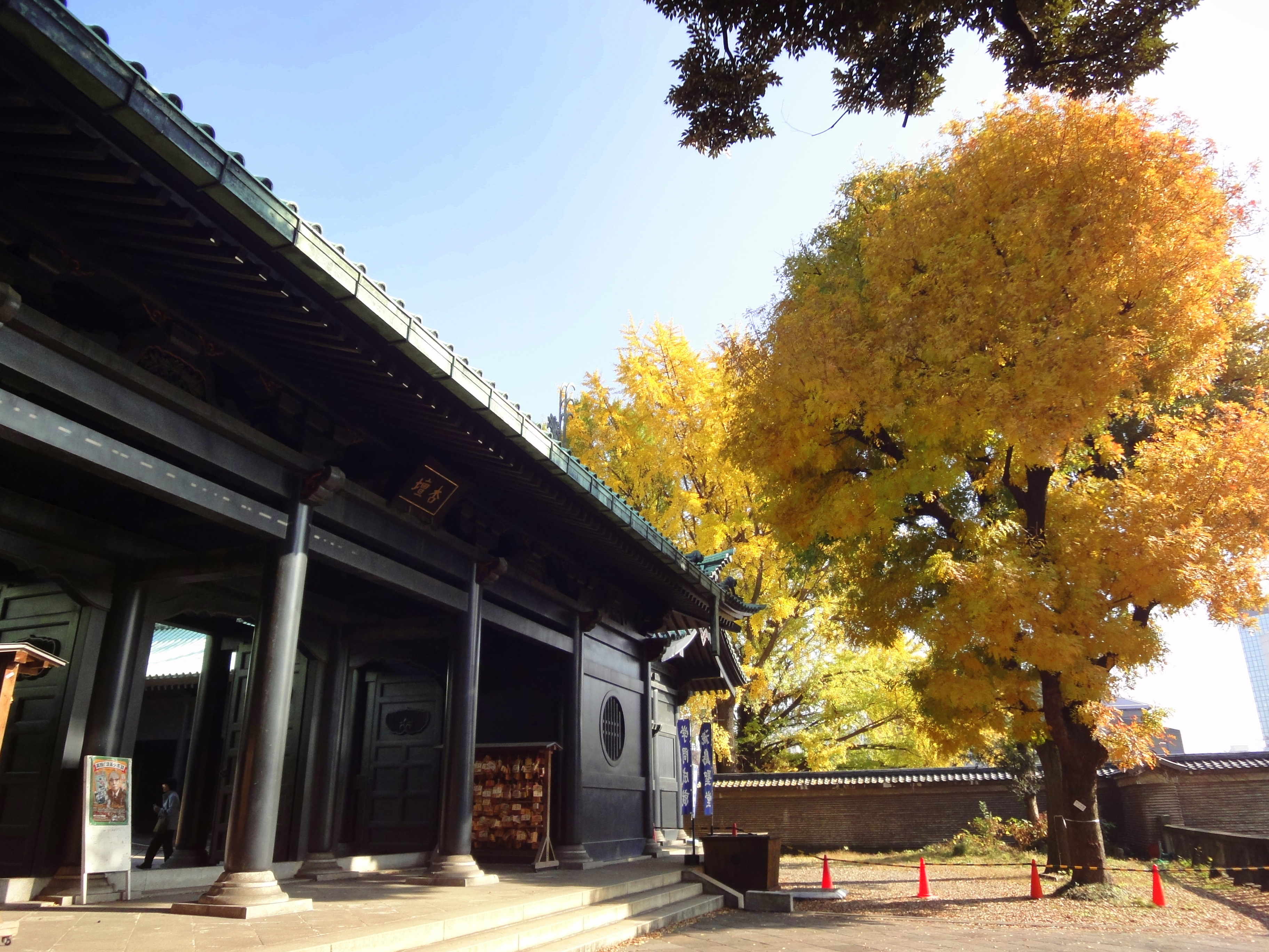 Ochanomizu